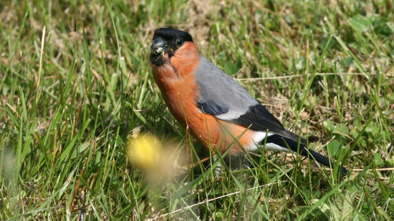 Bullfinch (Pyrrhula pyrrhula)